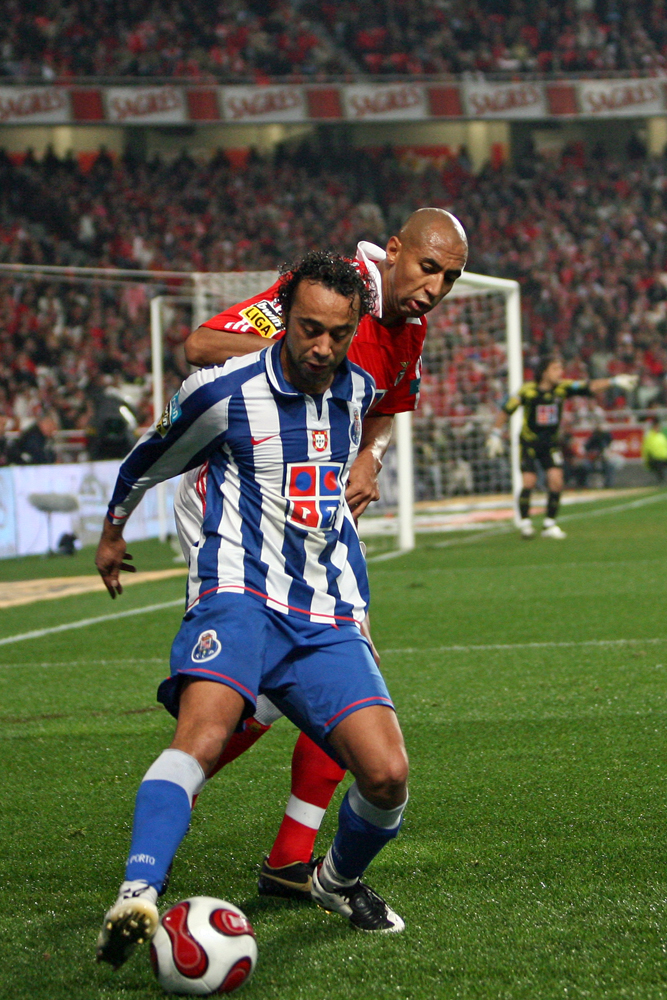 Ânderson Luís da Silva e Tarik Sektioui